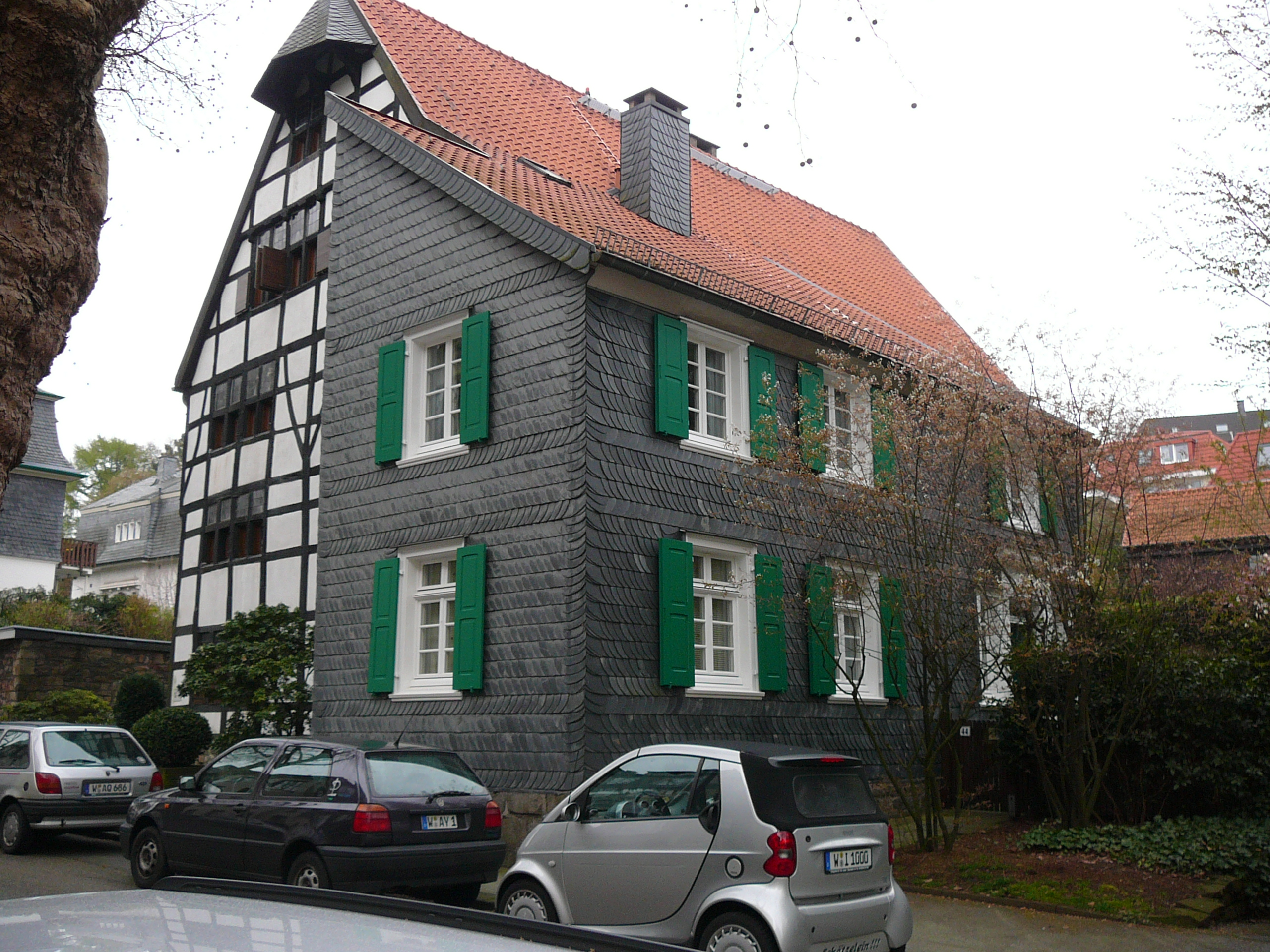 Emilstraße, Wuppertal